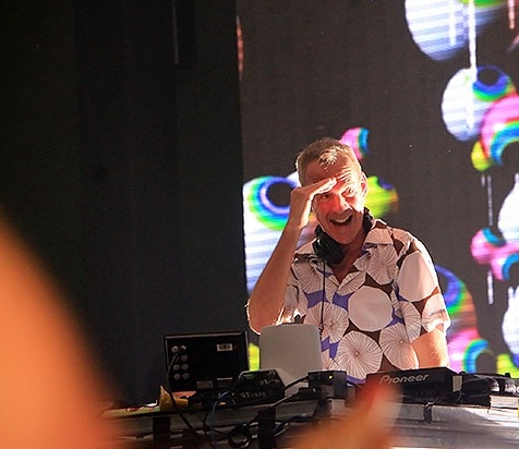 Fatboy Slim ( Quentin Leo Cook) nascido em 16 de julho de 1963, Kent, Grã-Bretanha), também conhecido como Norman Cook, é um músico do Reino Unido. Apesar de originalmente baixista em uma banda de rock (The Housemartins), somente sob o codnome de Fatboy Slim e com o toca-discos atingiu o auge de sua carreira. Foto tomada durante apresentação em Brasília.